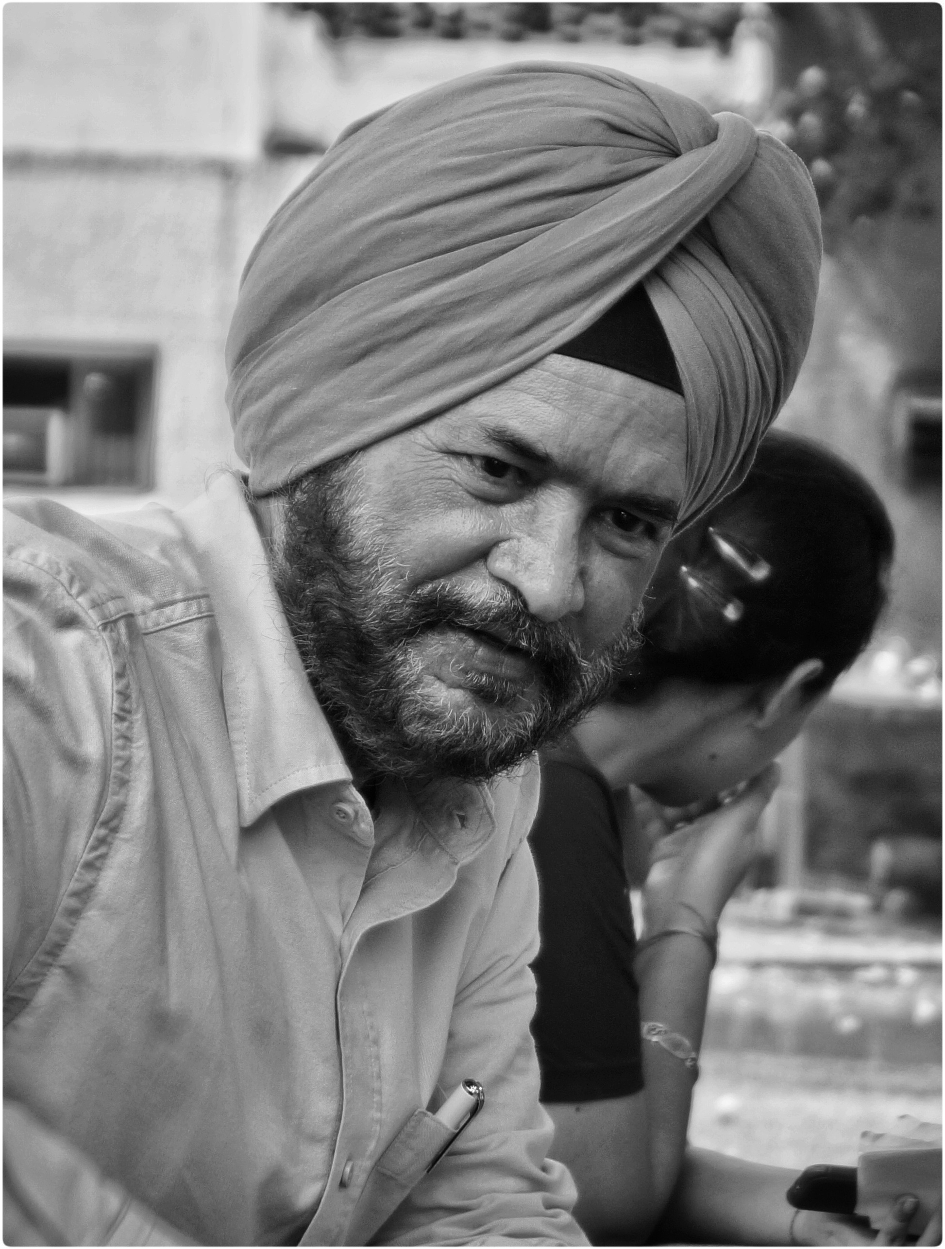 ਪੰਜਾਬੀ: ਅੰਬਰੀਸ਼ ਇੱਕ ਪੰਜਾਬੀ ਕਵੀ ਹੈ।